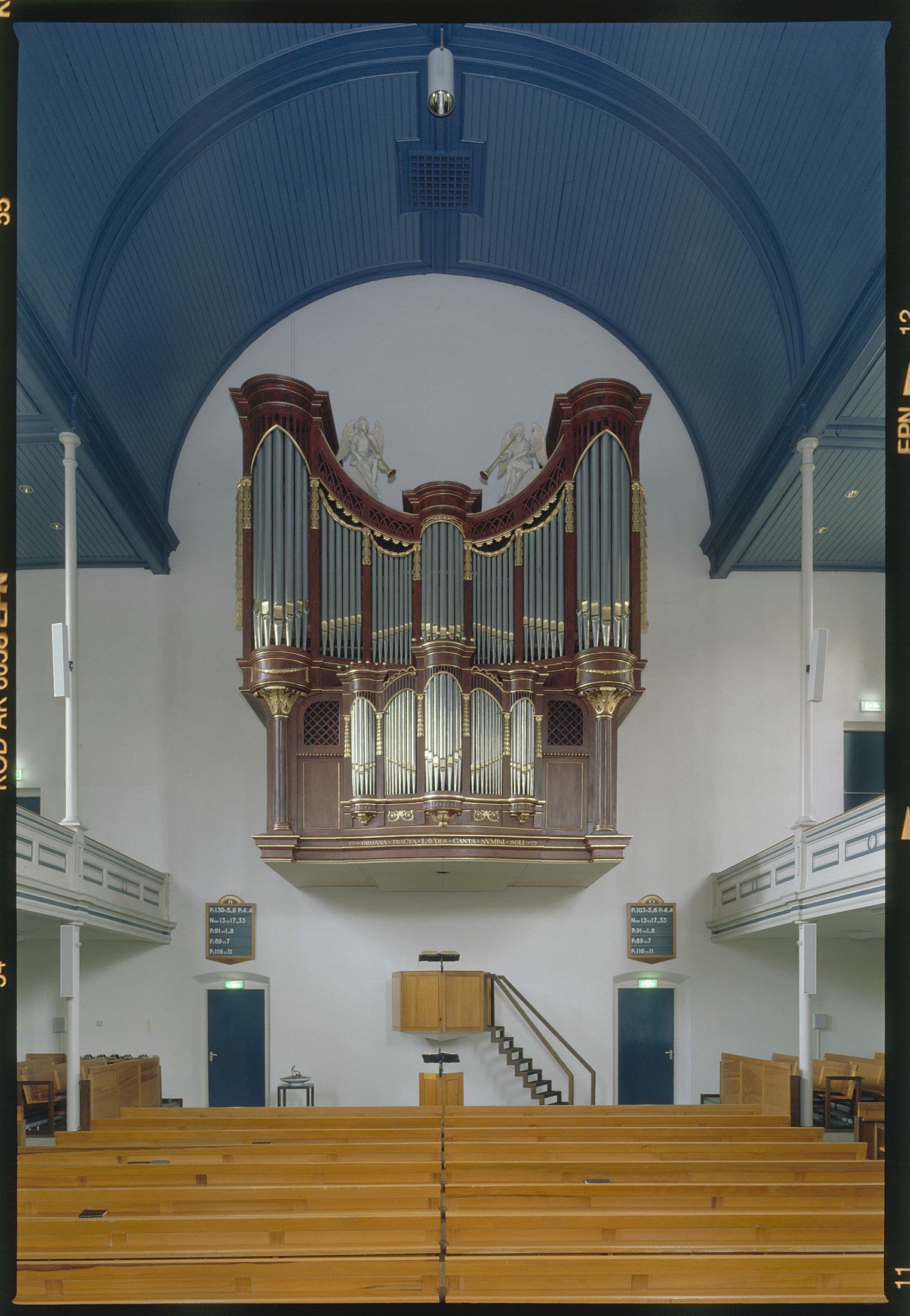 Gereformeerd Gemeente, Westerkerk: Interieur, aanzicht orgel (opmerking: Gefotografeerd voor Het Historische Orgel in Nederland 1790-1818)